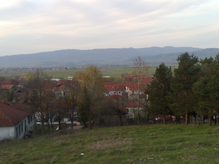 Panorama Čekmina Sliku sam načinio sam.